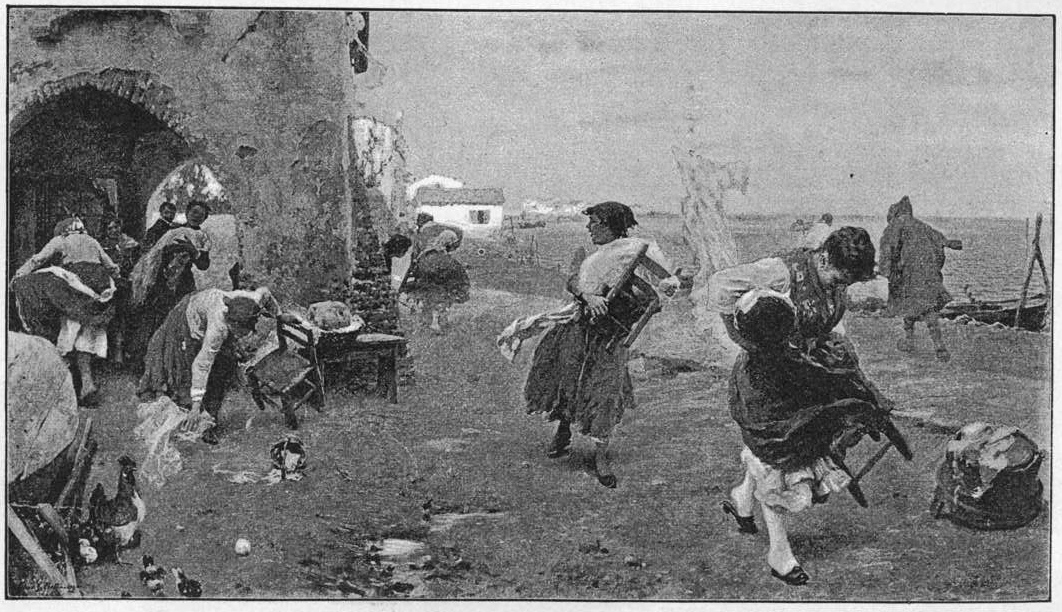 Ein Windstoss